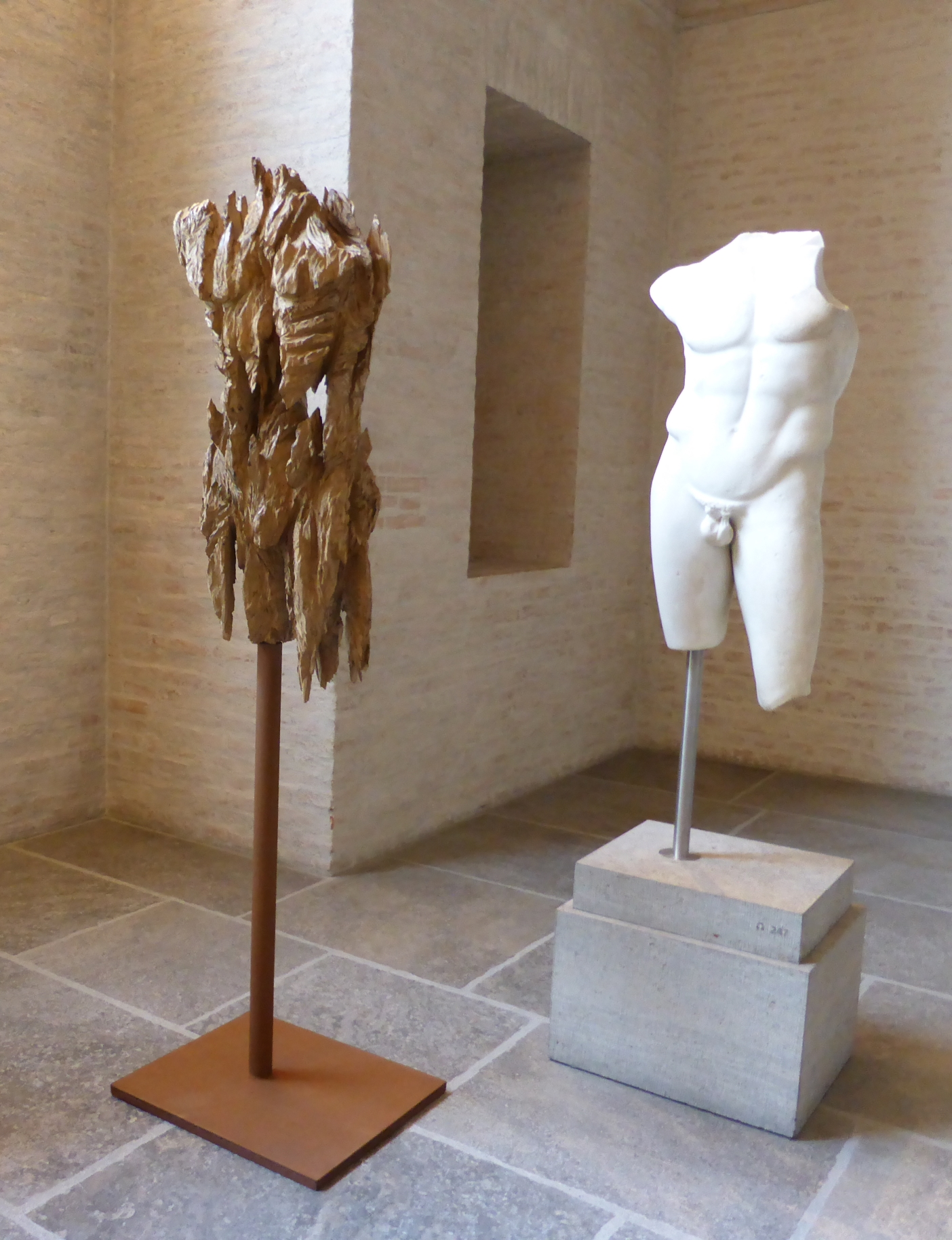 Zerklüfteter Torso gefertigt aus Eichenstamm